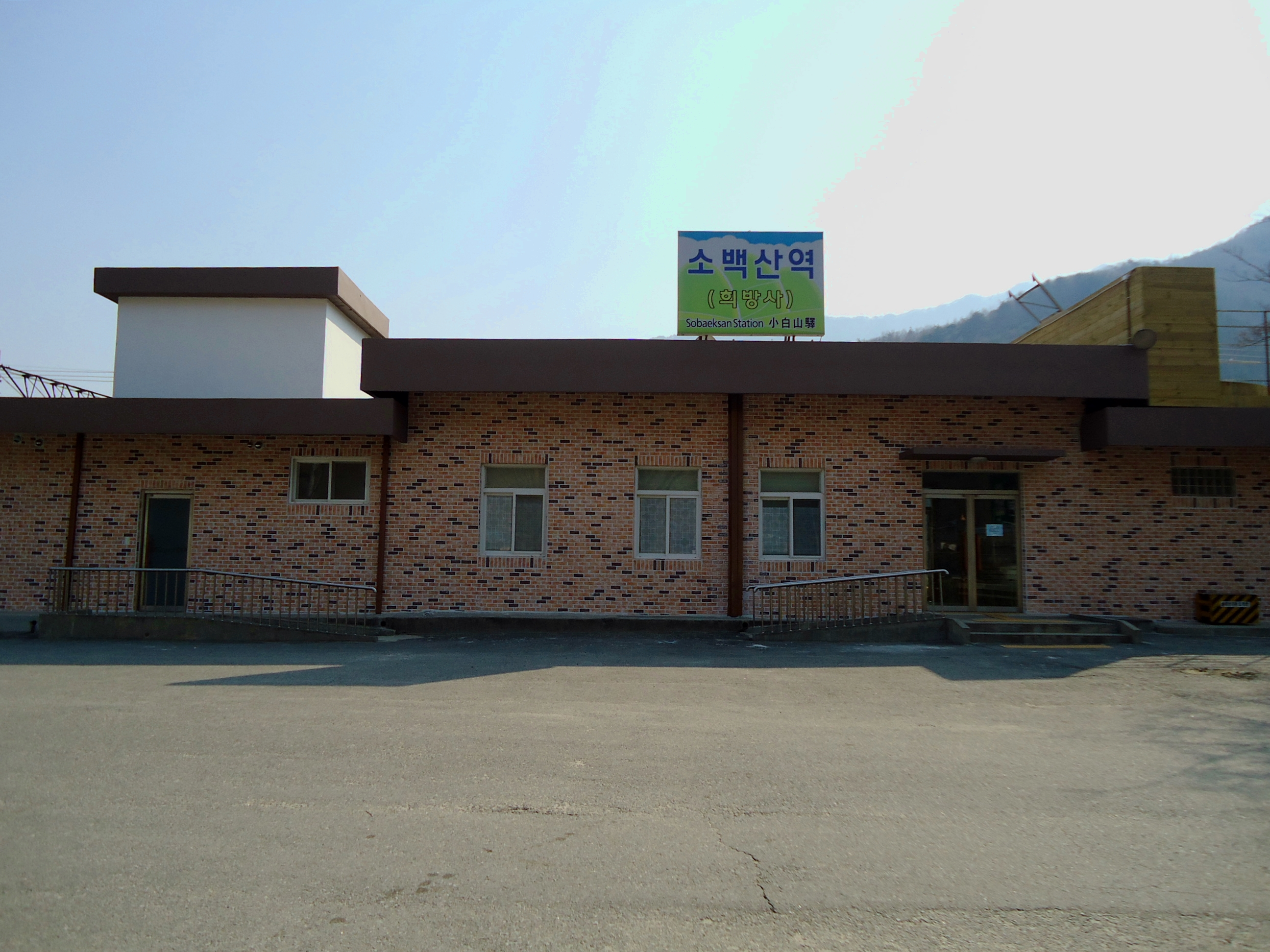 희방사역 역사